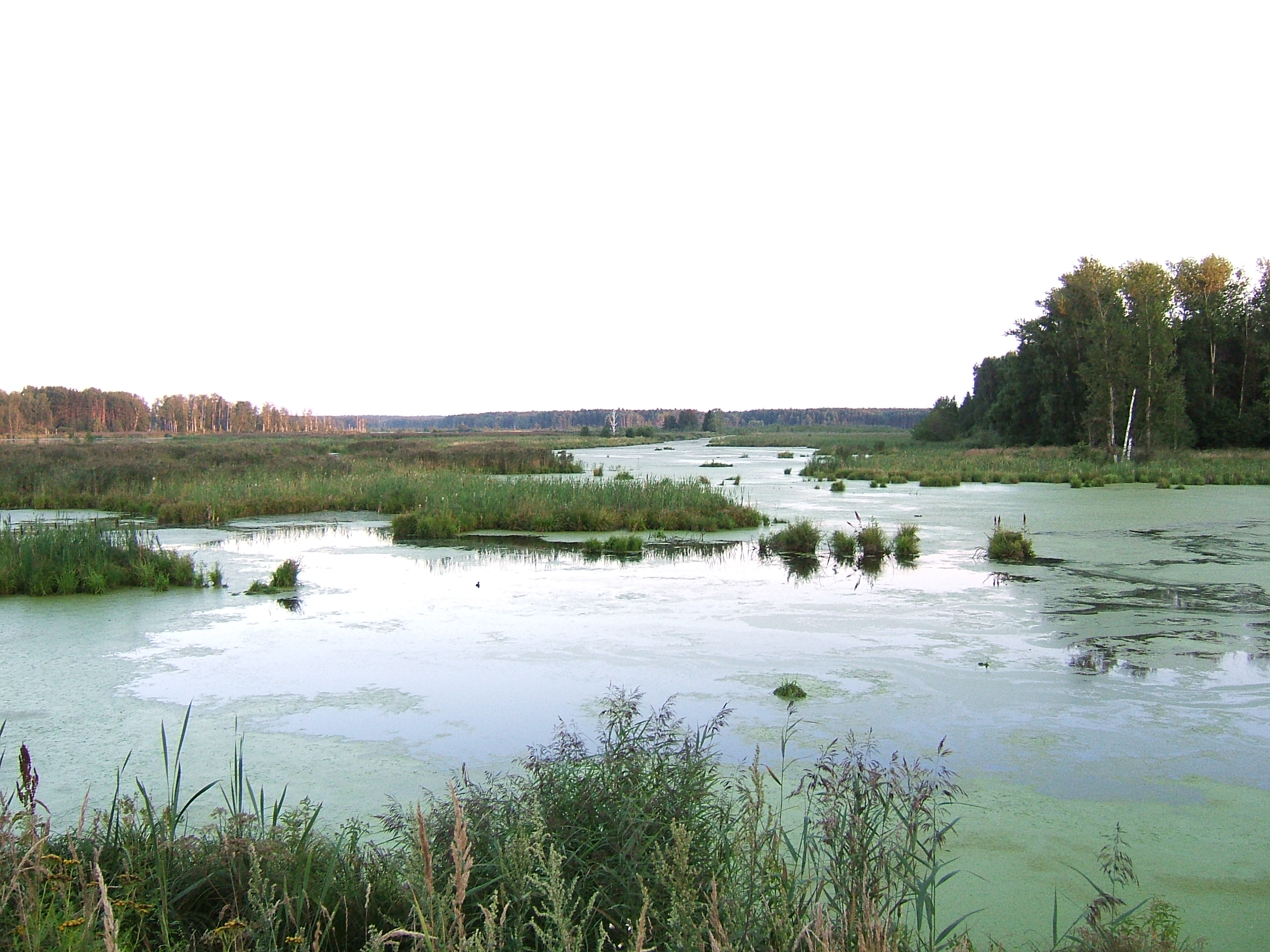 Московская область. Национальный парк "Лосиный Остров", Верхне-Яузские болота, сентябрь 2006 г.